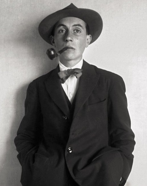 Manuel Antonio Pérez Sánchez (1900-1930)